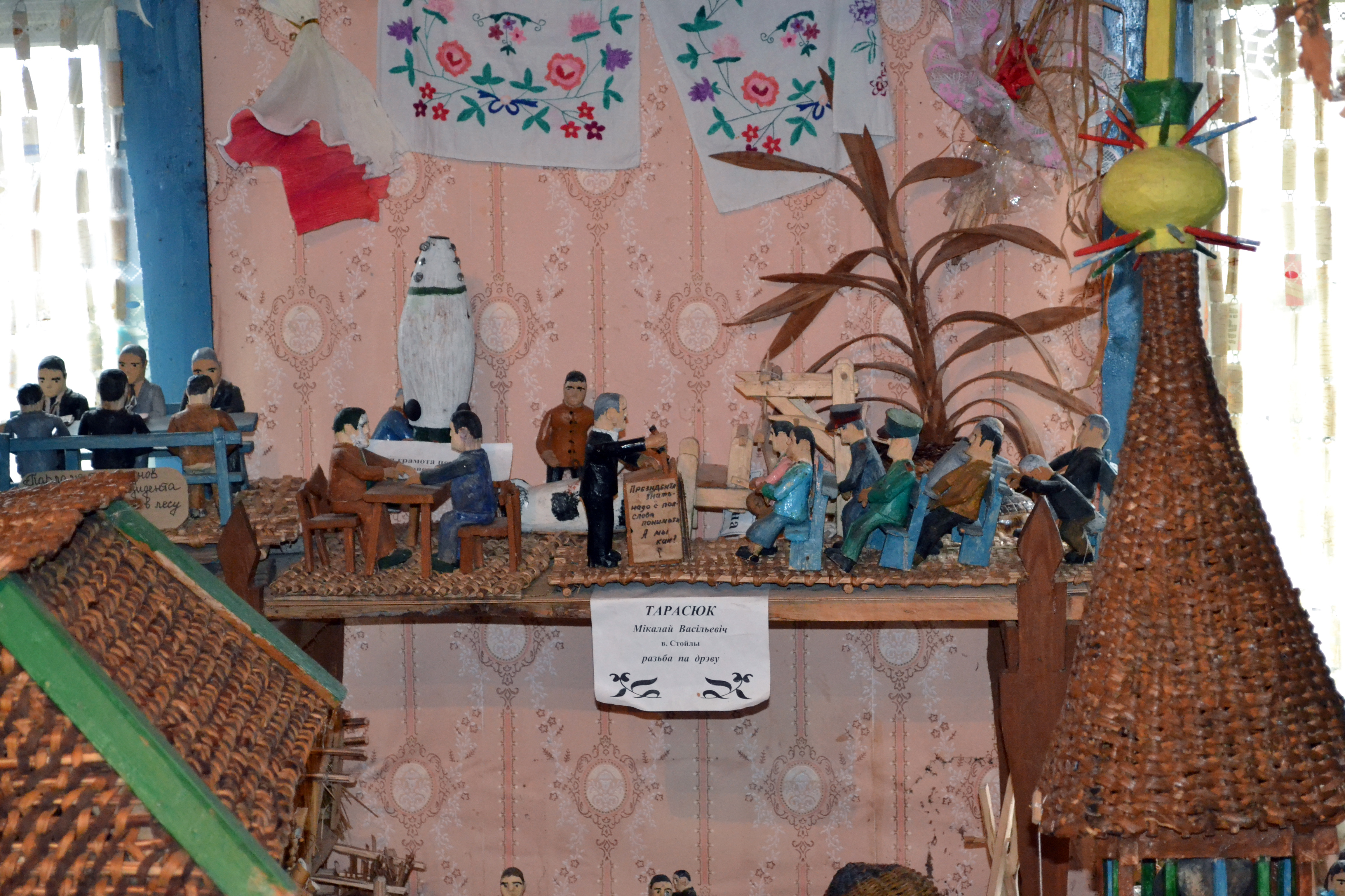 Беларуская (тарашкевіца): Музэй «Успаміны Бацькаўшчыны» на сядзібе Мікалая Тарасюка ў Стойлах Пружанскага раёну